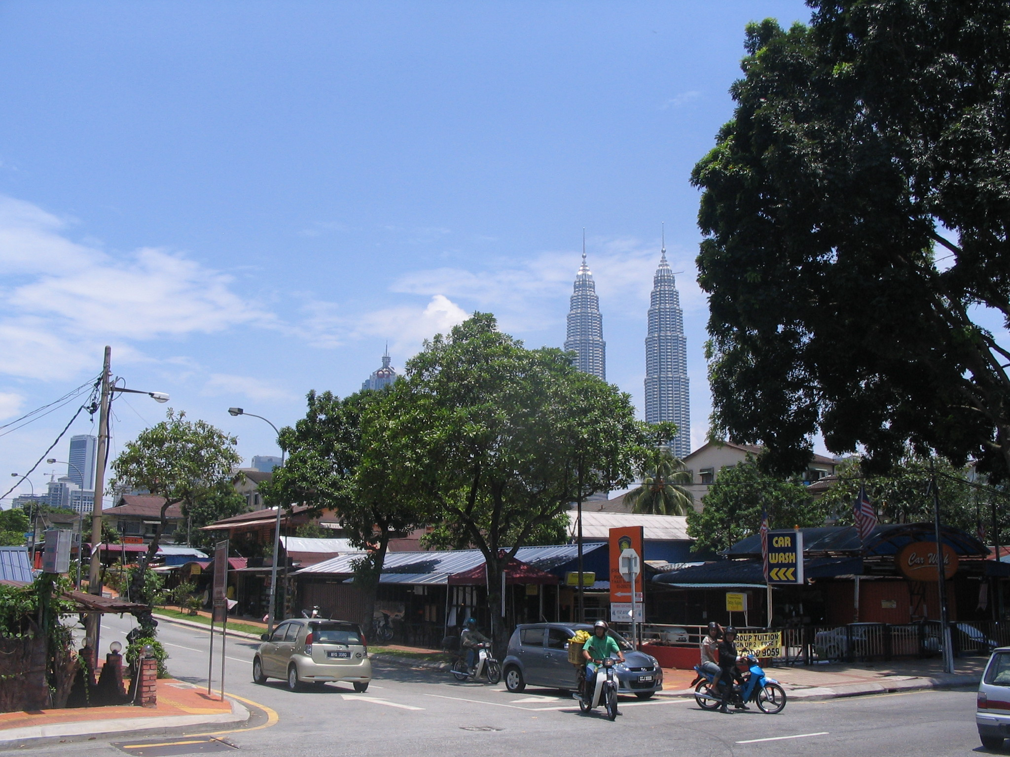 Kampung Baru - Jalan Rajah Abdullah